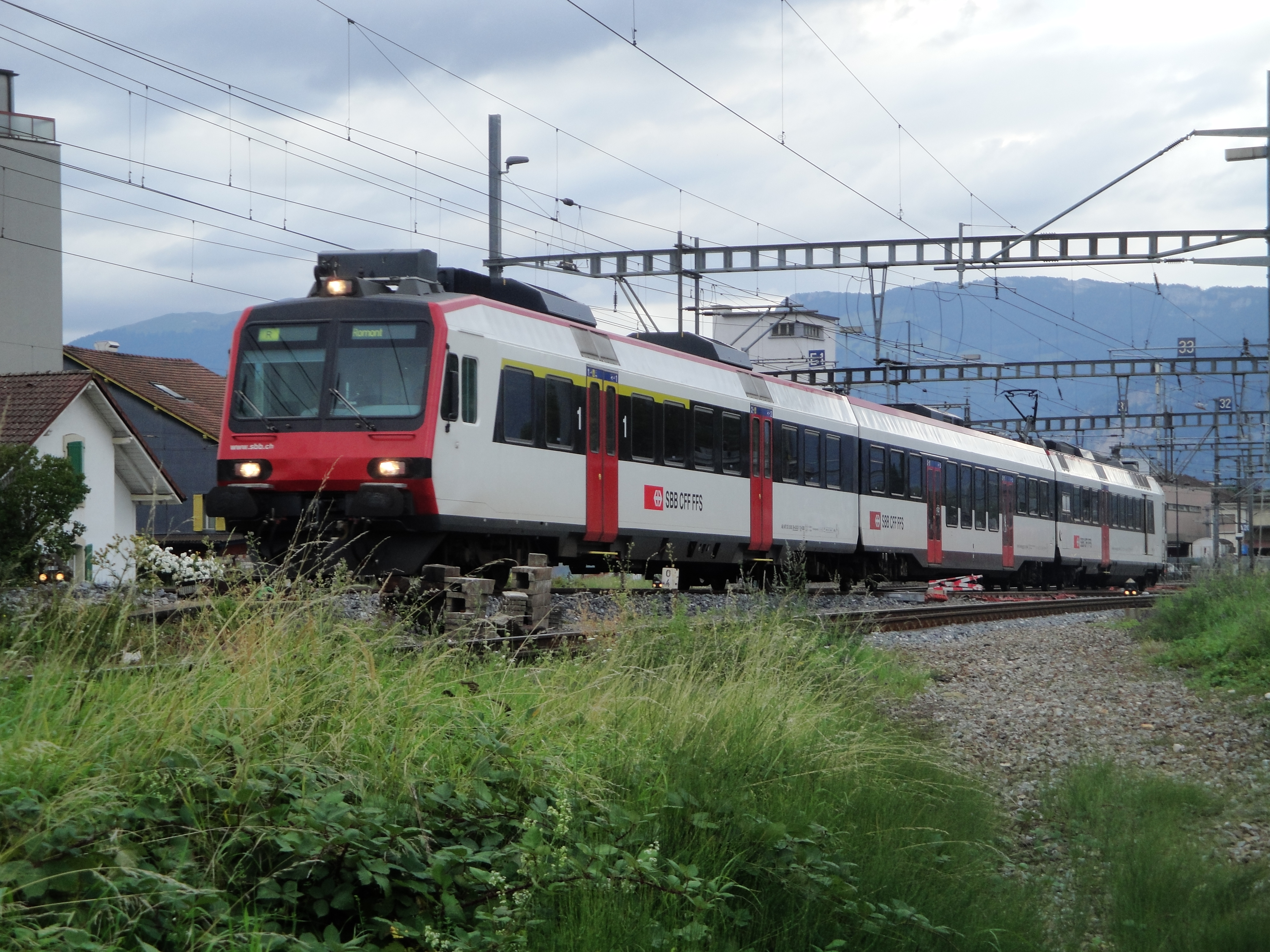 Cette rame RBDe 560 DO "Domino" vient de sortir de la gare d'Yverdon-les-Bains (Vaud, Suisse) pour se rendre à son terminus, Romont (Fribourg, Suisse) en passant par Payerne (Fribourg, Suisse)